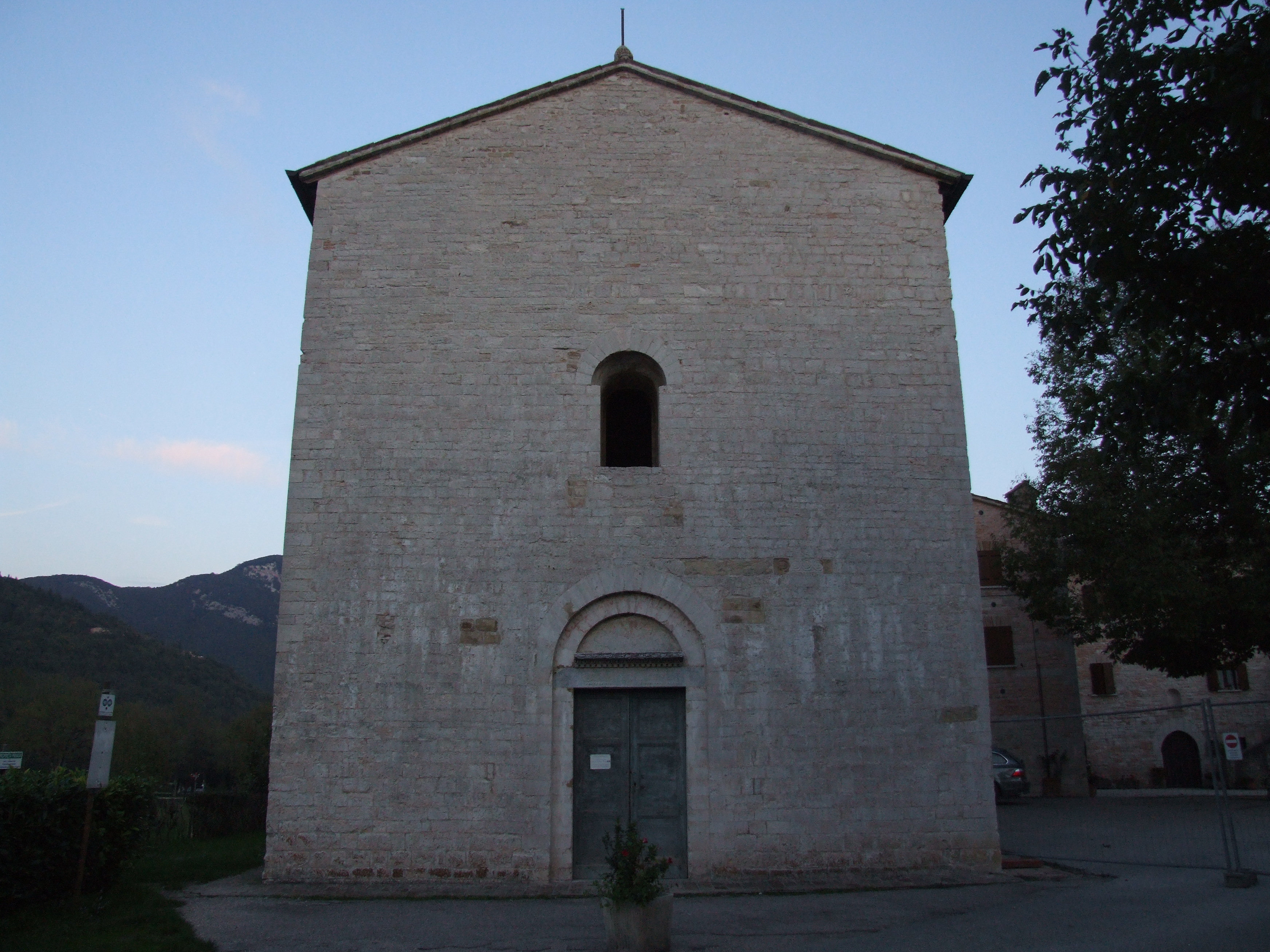 Abbazia di San Vincenzo This is a photo of a monument which is part of cultural heritage of Italy.